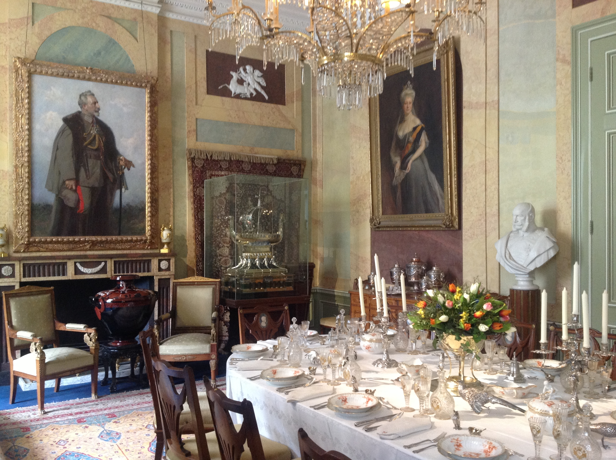 Huis Doorn, locatie van een "editathon" (schrijfmiddag) van Wikimedia Nederland.